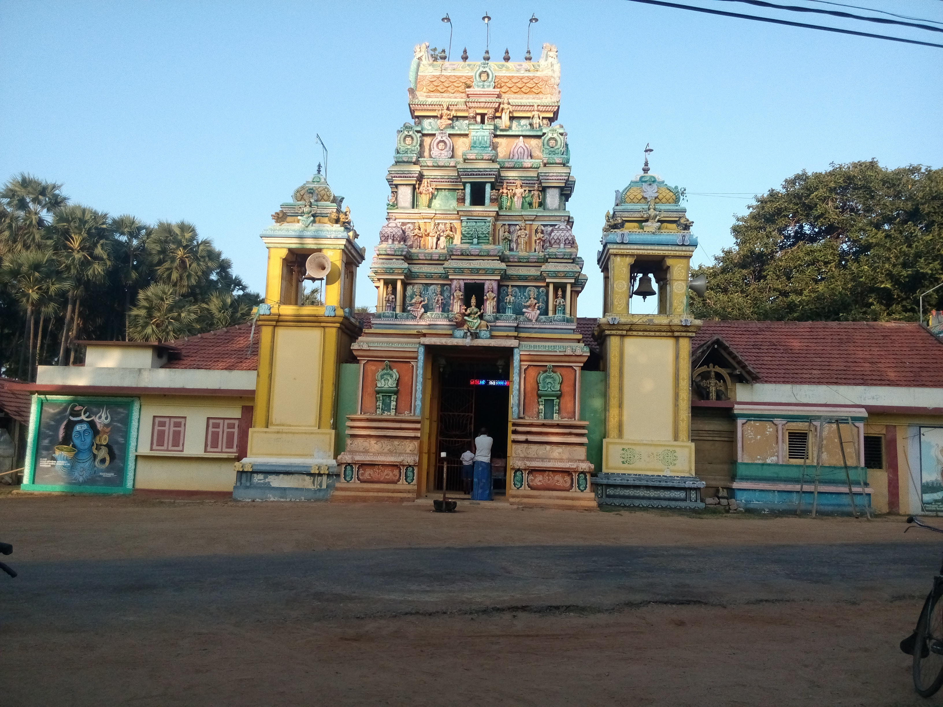 முத்துமாரி அம்மன் ஆலயம்